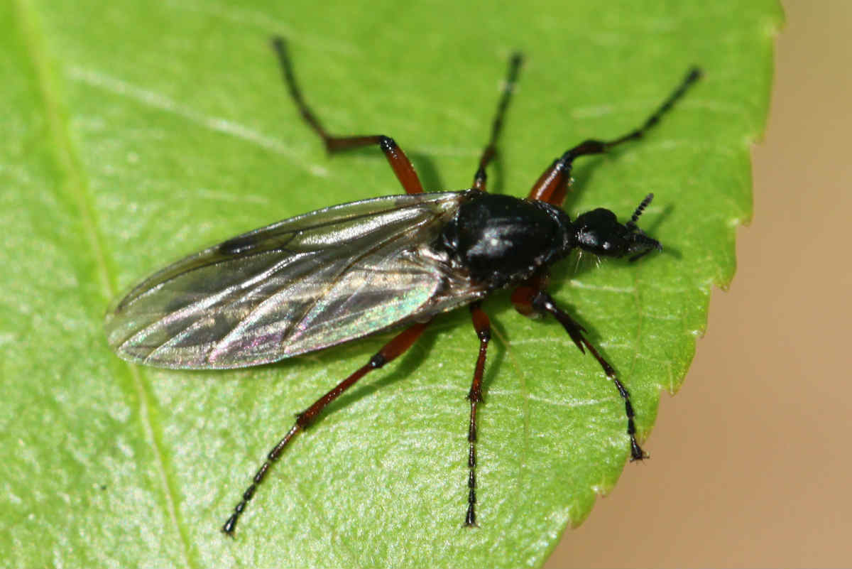 Johannis-Haarmücke (Bibio johannis), Weibchen, am 20.4.2017 in der Schwetzinger Hardt